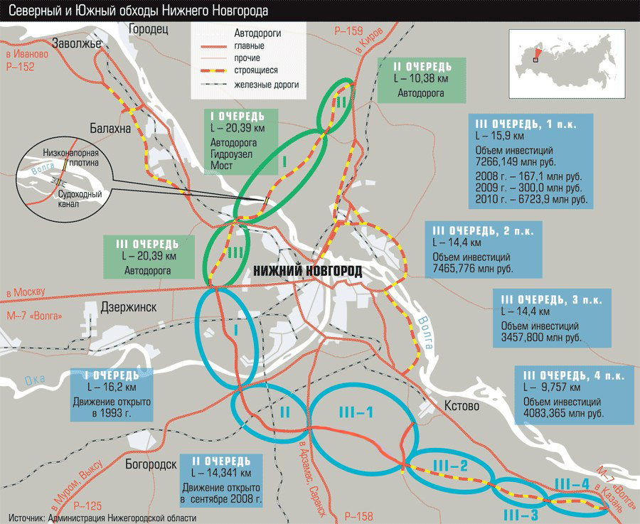 Северный и южный объезд